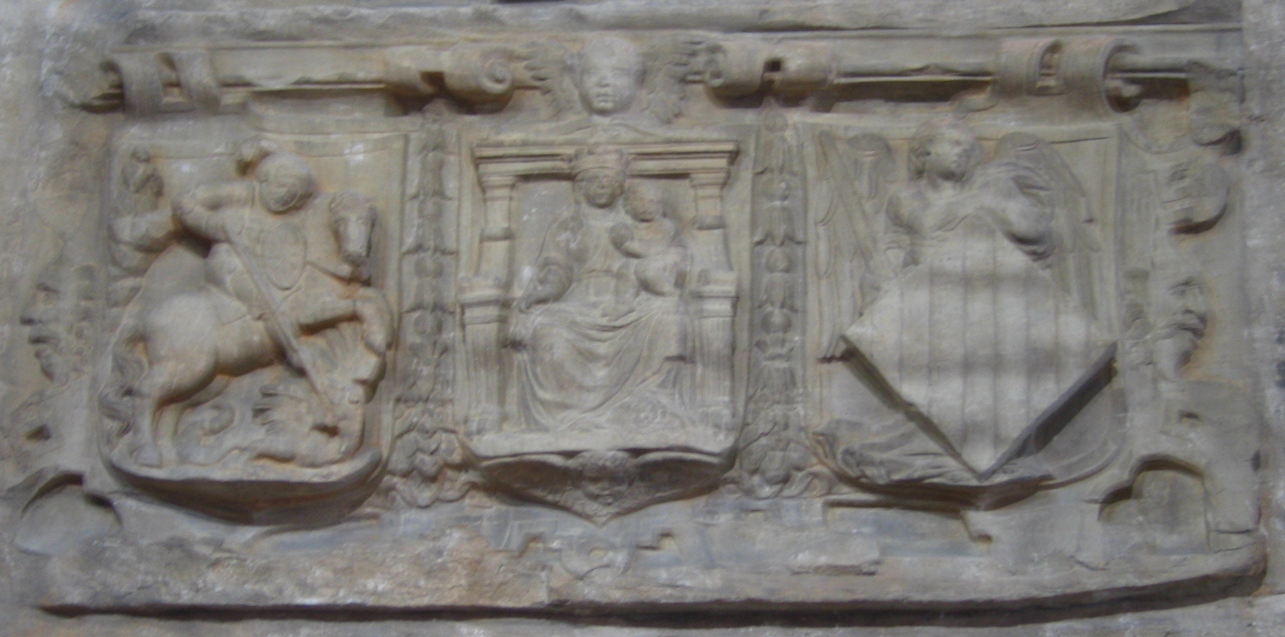 Escut de la Generalitat Valenciana